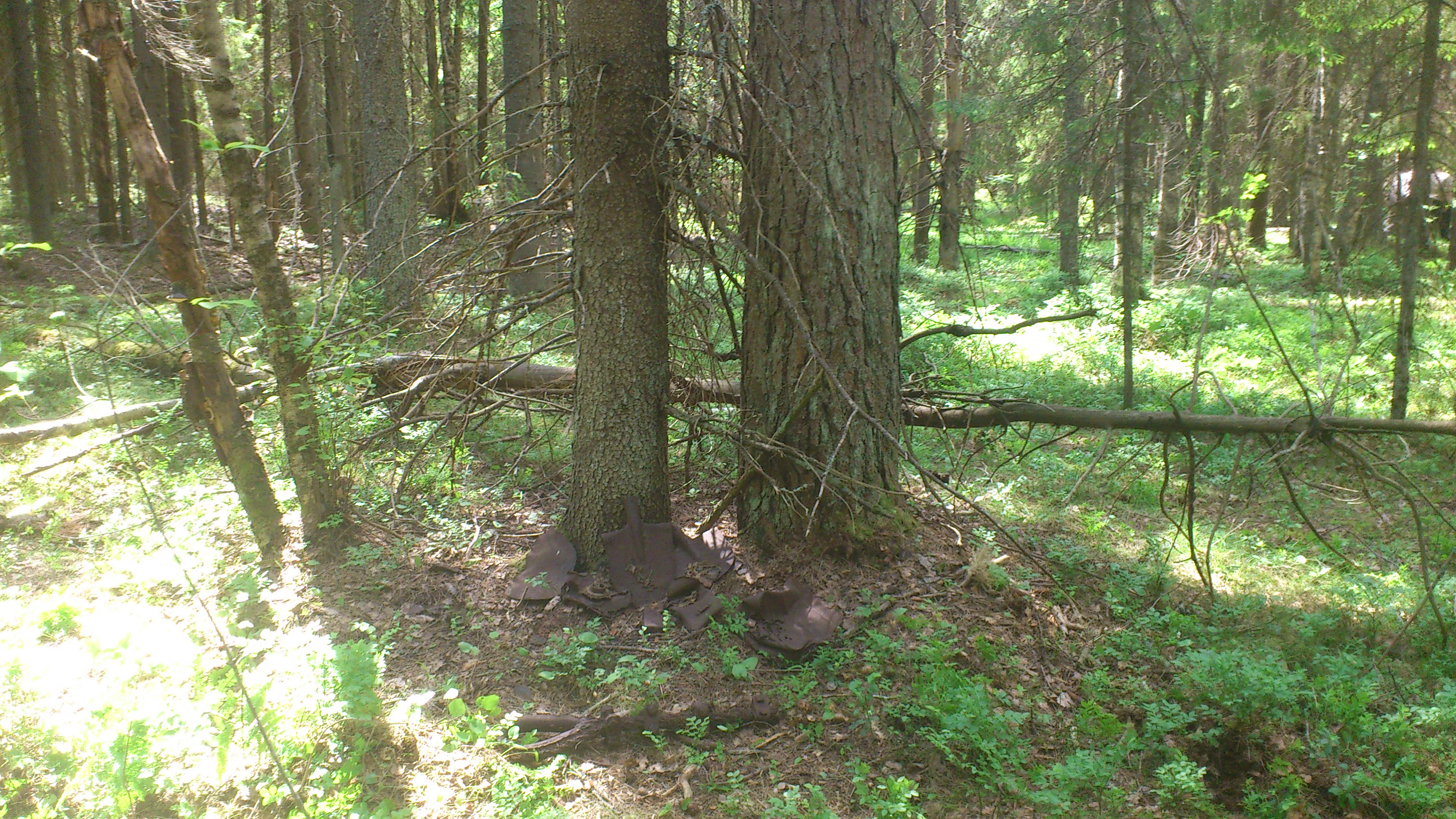 Остатки танка Т-60 1-й Краснознамённой танковой бригады, уничтоженного 12 июня 1944 года при прорыве линии ВТ. Экипаж: лейтенант Николай Фатеев и старший сержант Юрий Харитонский. Место гибели экипажа в районе посёлка Лебяжье, Выборгский район Ленинградской области.